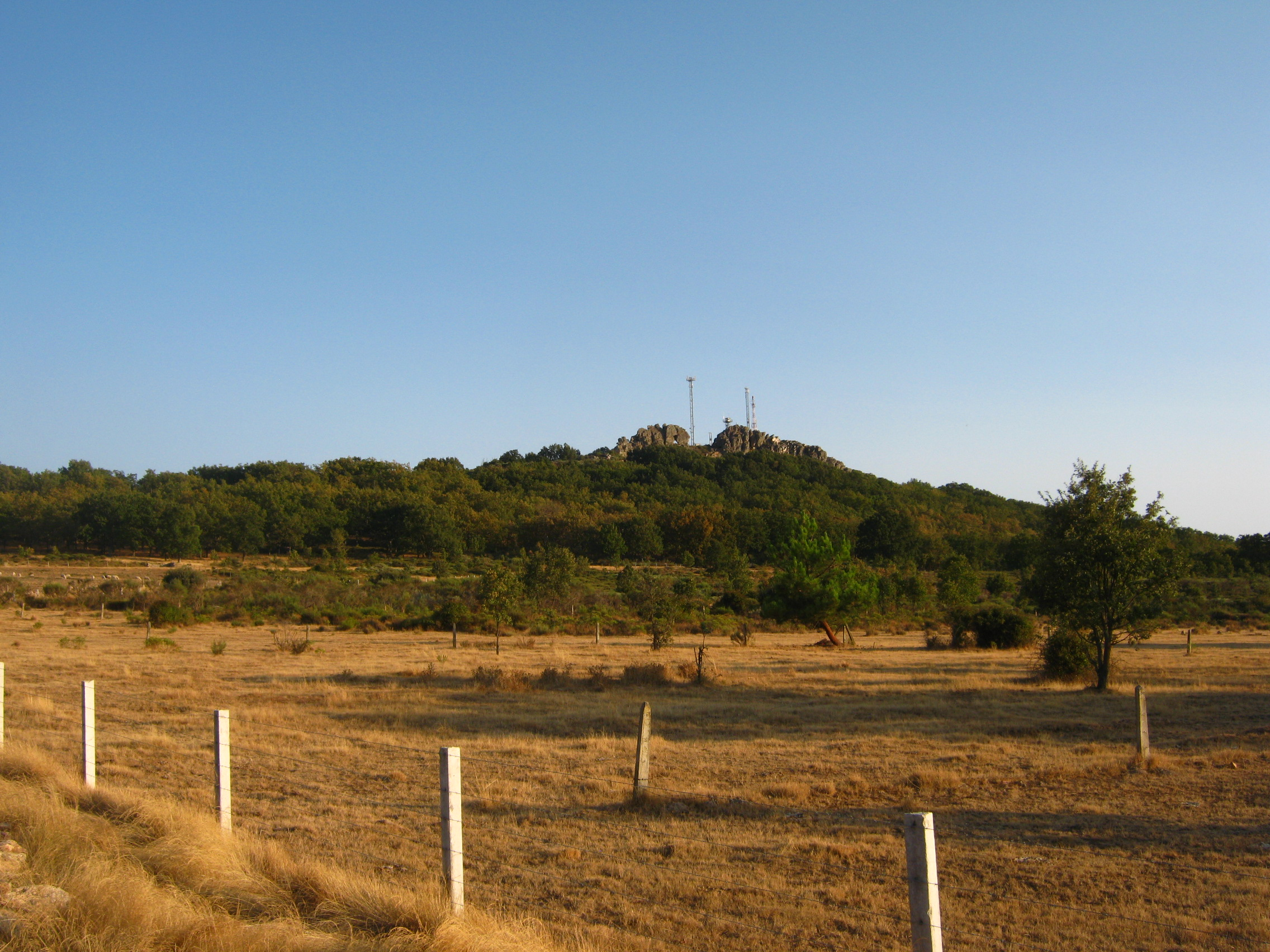 Vista del Teso de Peñahorcada, en Cerezal de Peñahorcada